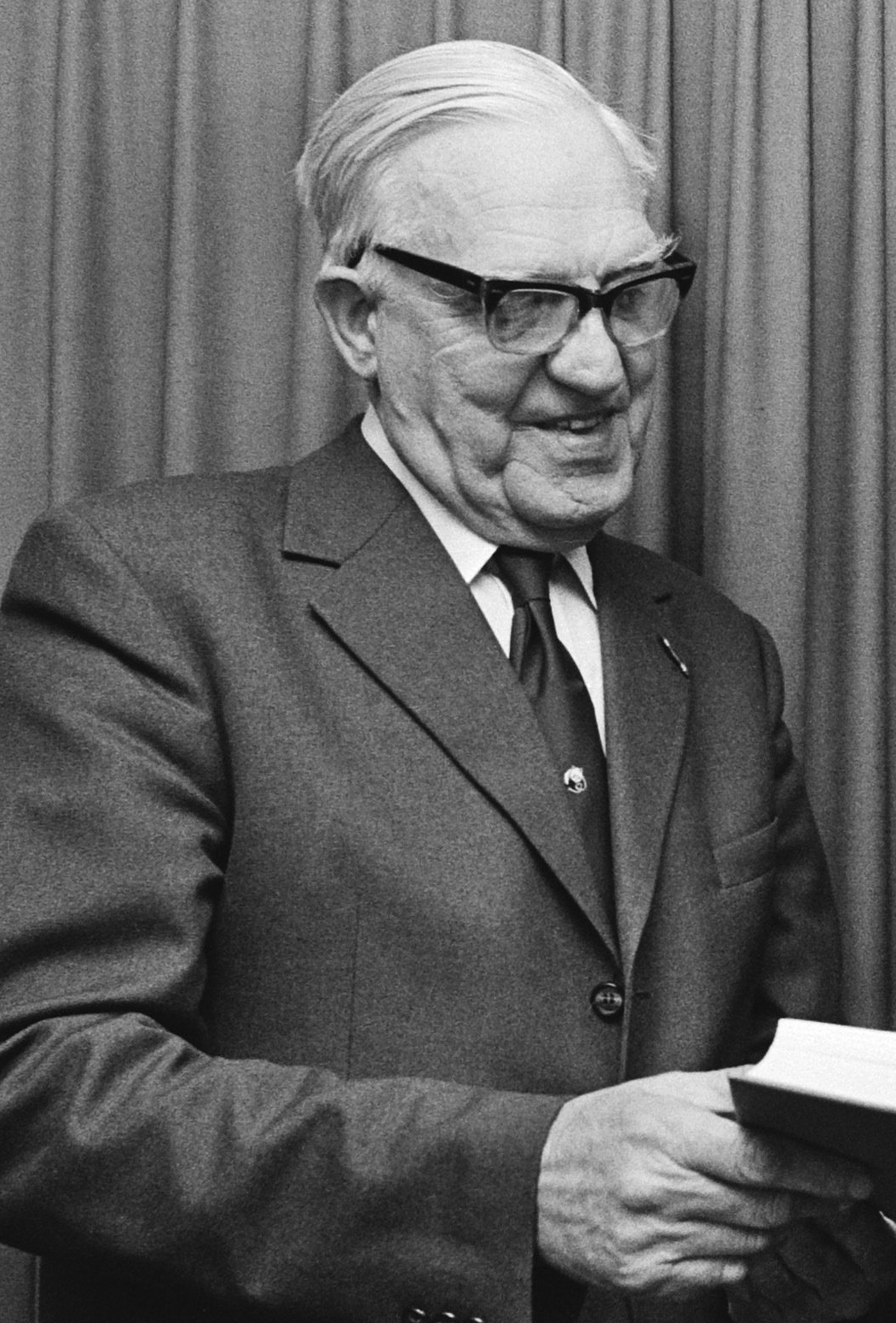 Patholoog-anatoom dr. J. Zeldenrust (l) overhandigt het eerste exemplaar van zijn boek aan minister De Ruiter van Justitie 8 november 1978